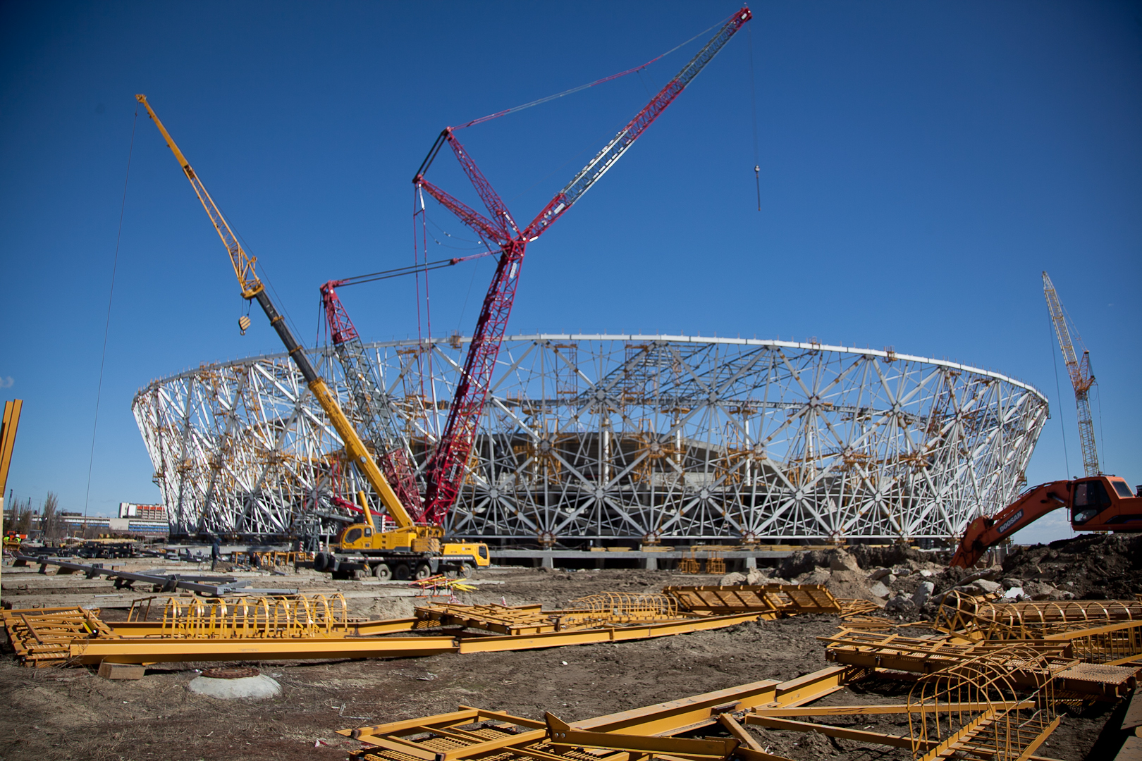 Строительство "Волгоград Арены" в марте 2017 года